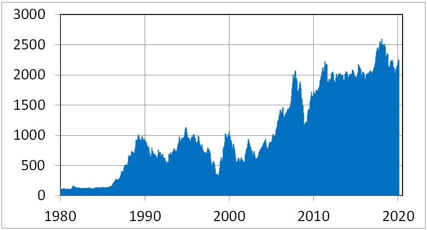 2017년 7월 13일 종가 기준, 역대 코스피 지수